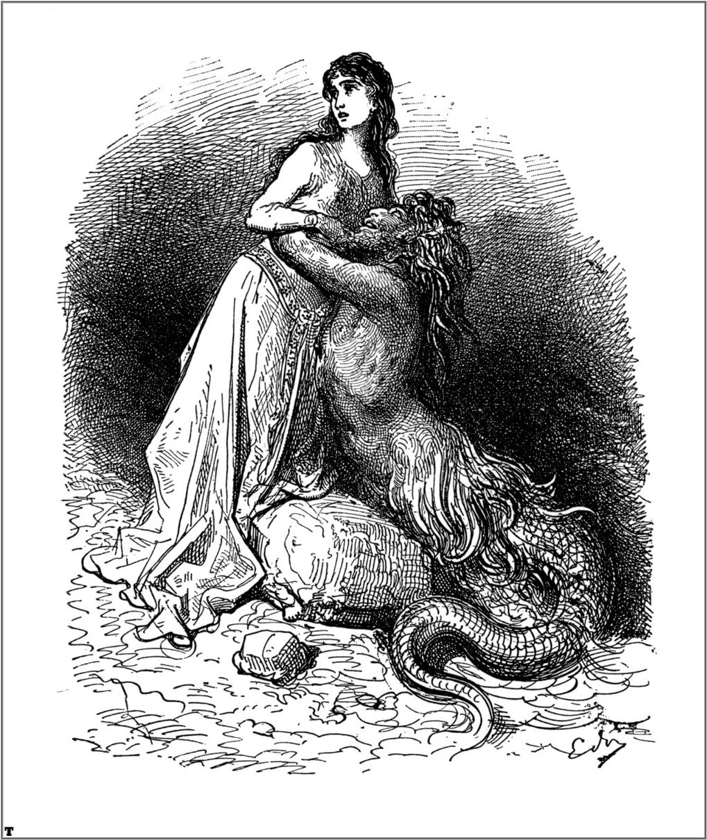 illustration of Ludovico Ariosto’s “Orlando Furioso”.